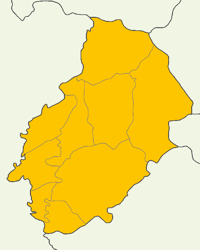 Kırıkkale'de 2014 Türkiye cumhurbaşkanlığı seçimi sonuçları